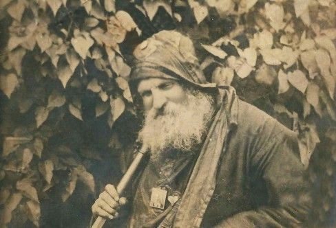 Пантелеймон (Пантелеимон) Прохоров (в миру Пётр Савельевич; 1811—1884) — схимонах, подвижник, основатель Костычевской Смоленской женской общины.